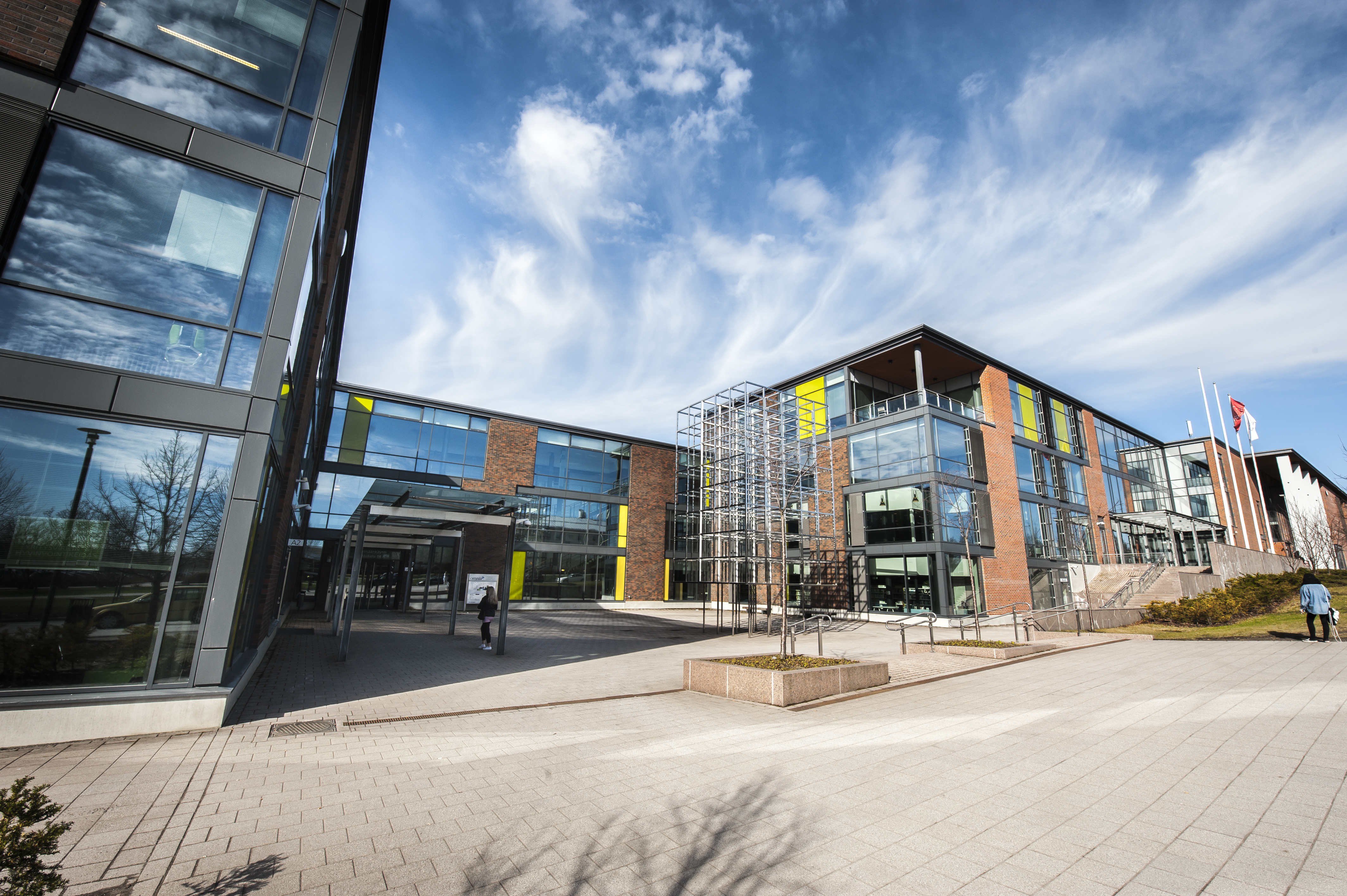 Omnian Kirkkokadun toimipiste Espoon keskuksessa.